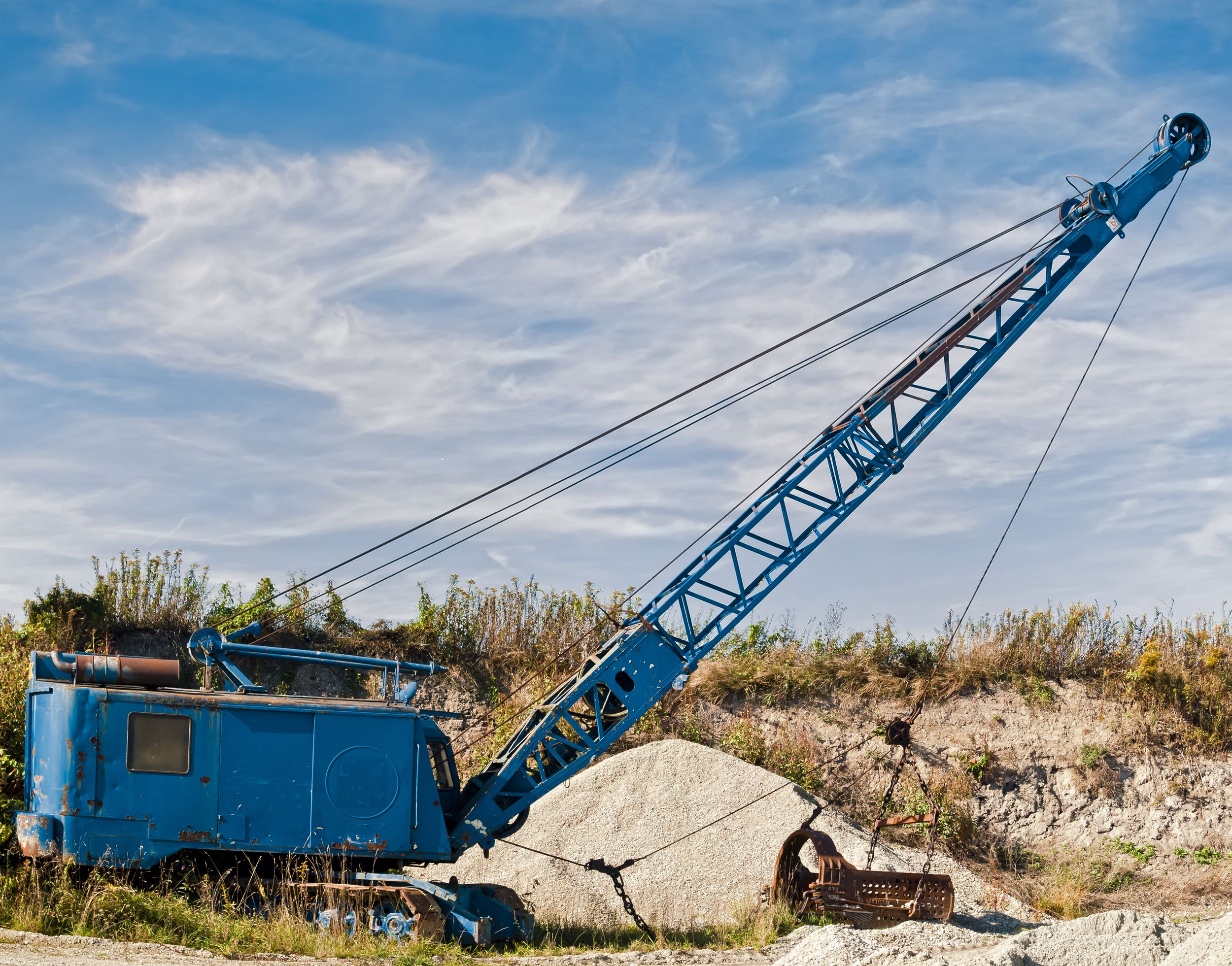 Menck M154 SILENT.